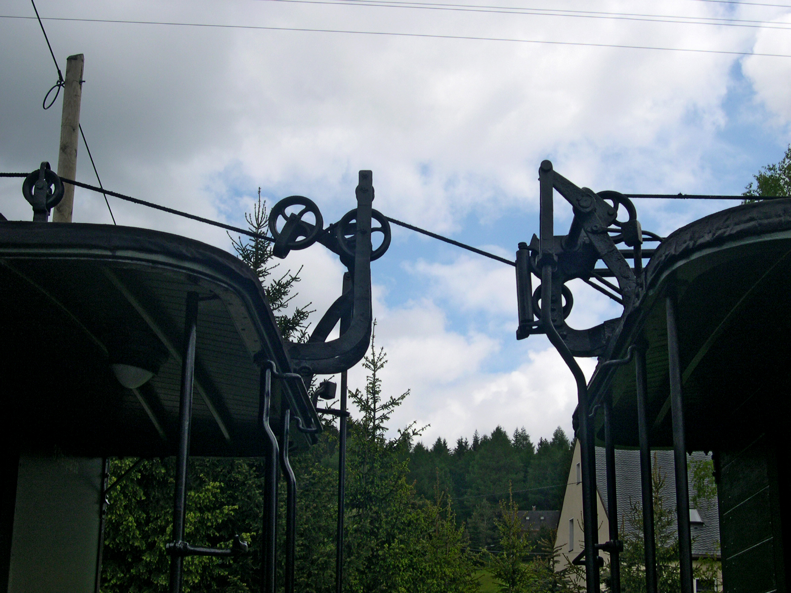 Vorrichtung mit Umlenkrollen auf dem Wagendach bei Schmalspurbahnen in Sachsen, hier Wagen der Pressnitztalbahn